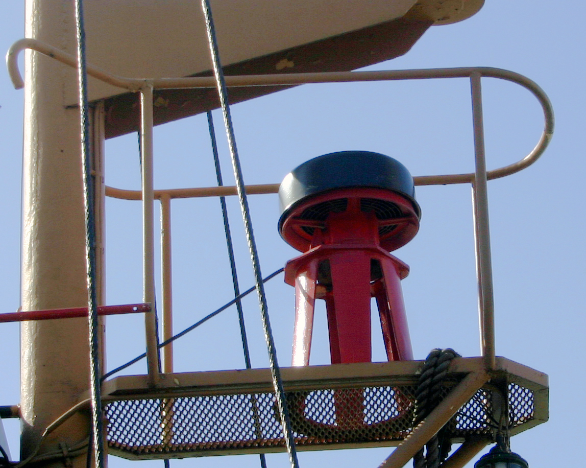 Description